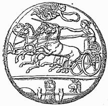 Quadriga mit Siegespreisen, Münze von Syrakus - aus Meyers Konversationslexikon von 1888 - Public Domain